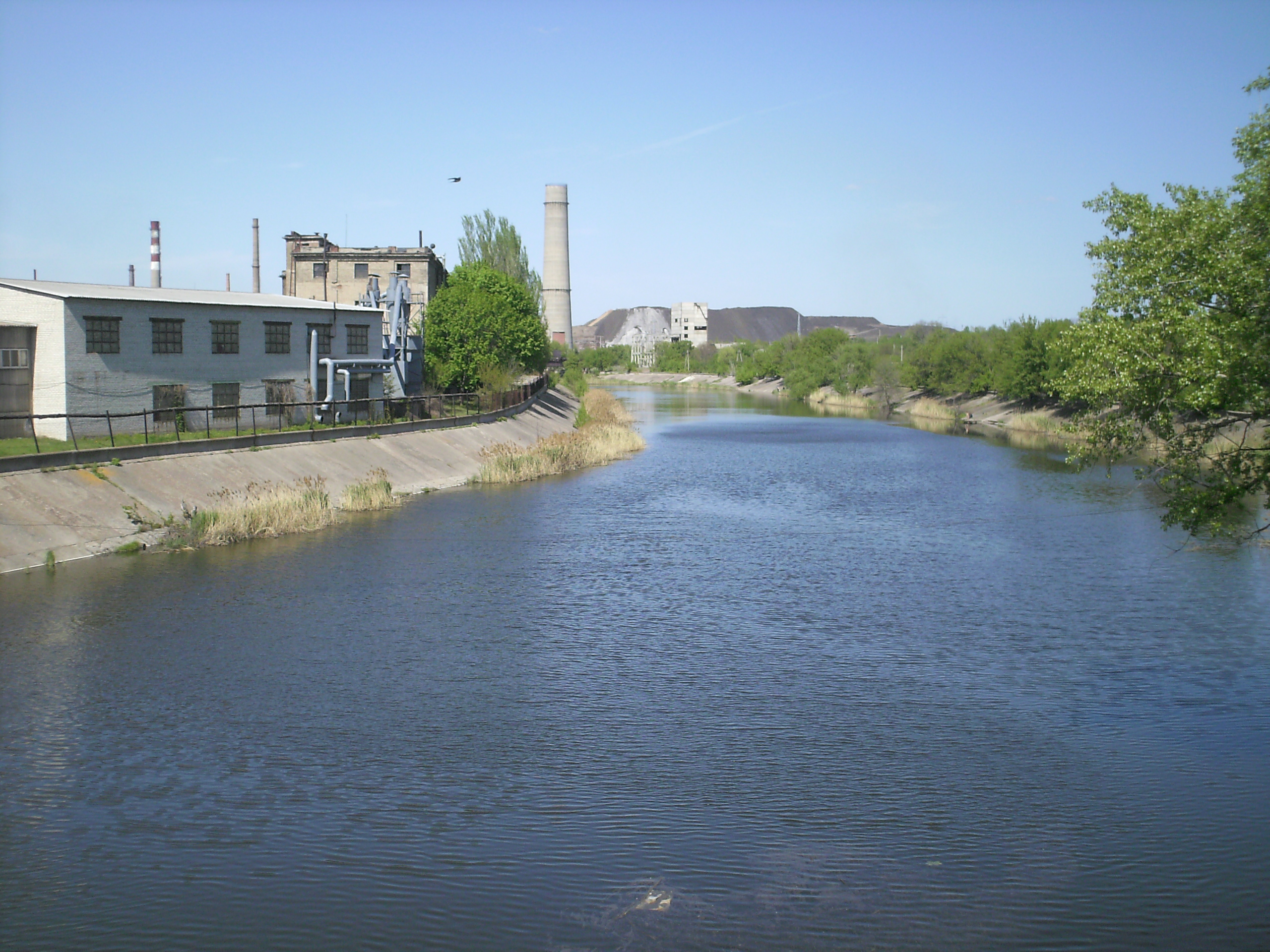 Казенний Торець у Краматорську